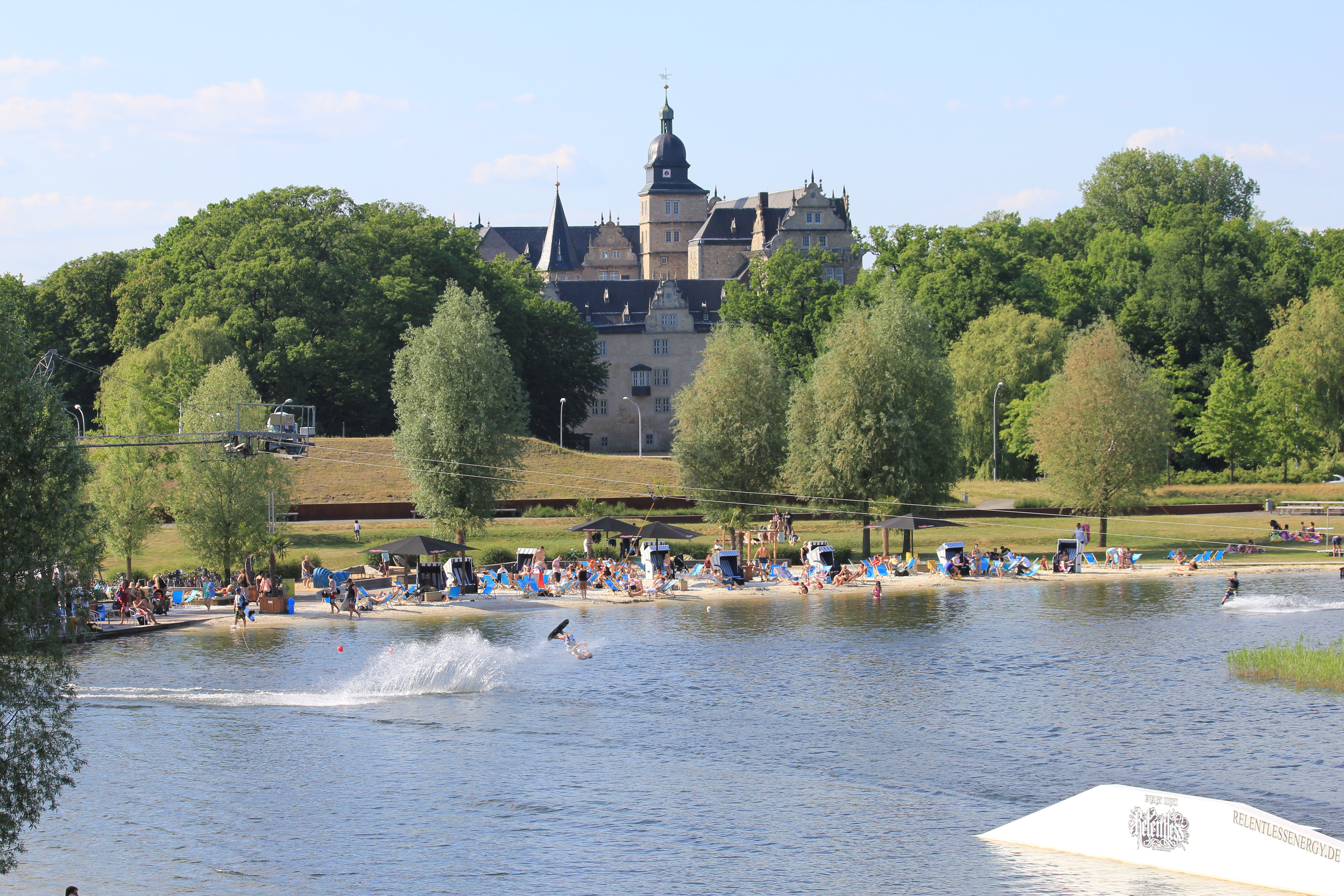 Wakepark im Allerpark Wolfsburg, dahinter Schloss Wolfsburg